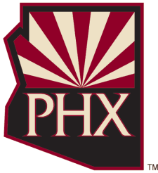 Alternatives Logo der Phoenix Coyotes